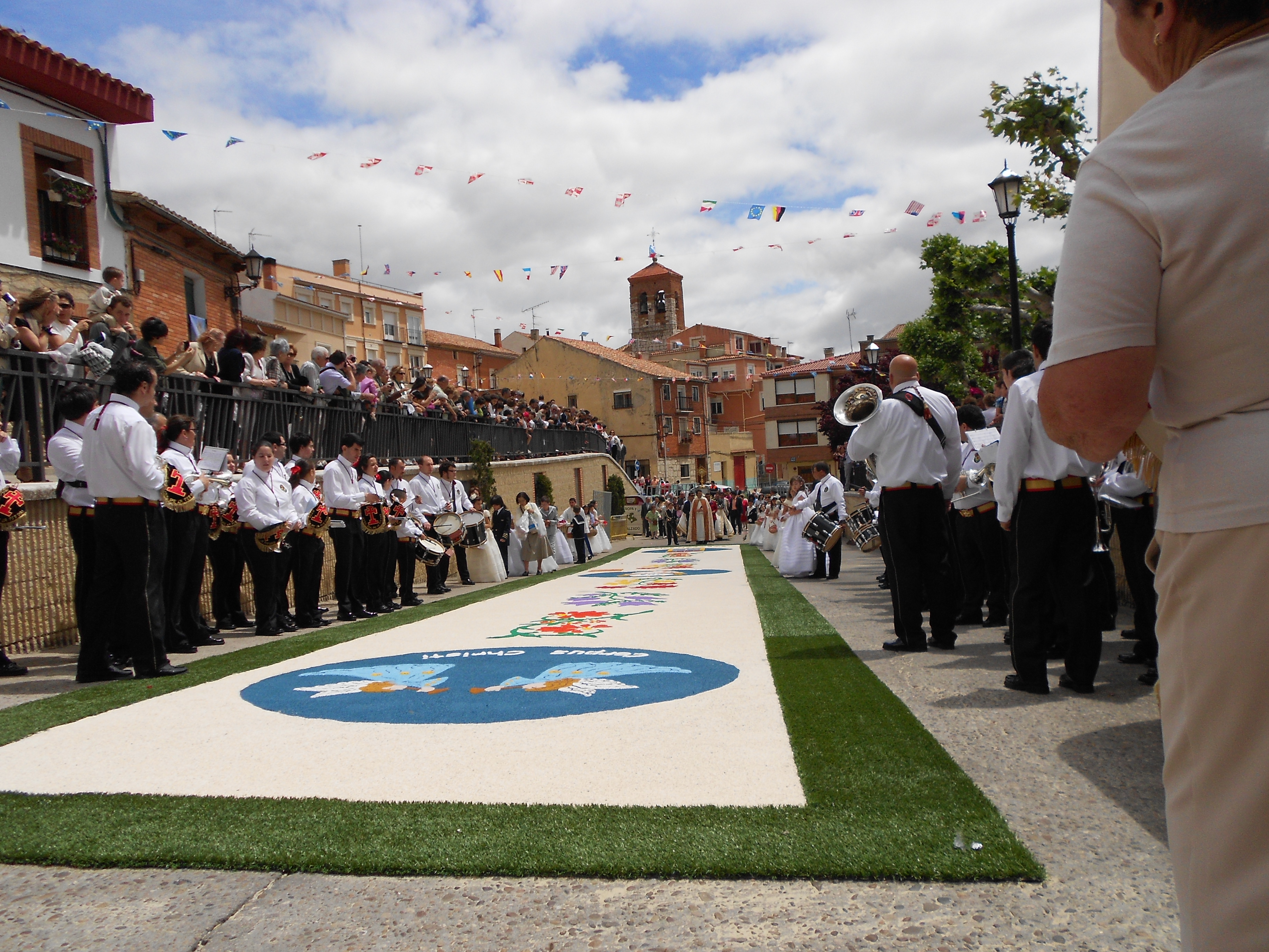 Alfombra de arena en la plaza Mayor de Zaratán, al paso de la procesión del Corpus Christi, con motivos de las fiestas del municipio.